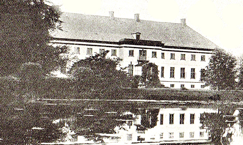 Krengerup er en hovedgård, som er dannet i 1600 af Gabriel Knudsen Akeleye. Gården fik et nyt navn i 1783, nu kaldt Frederikslund til 1917, nu atter kaldt Krengerup, og gården ligger i Ørsted Sogn, Båg Herred, Glamsbjerg Kommune. Hovedbygningen er opført i 1772